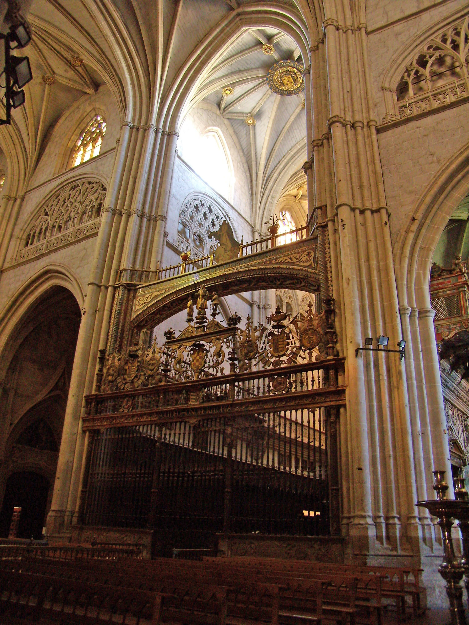 Reja del coro. Catedral de Palencia